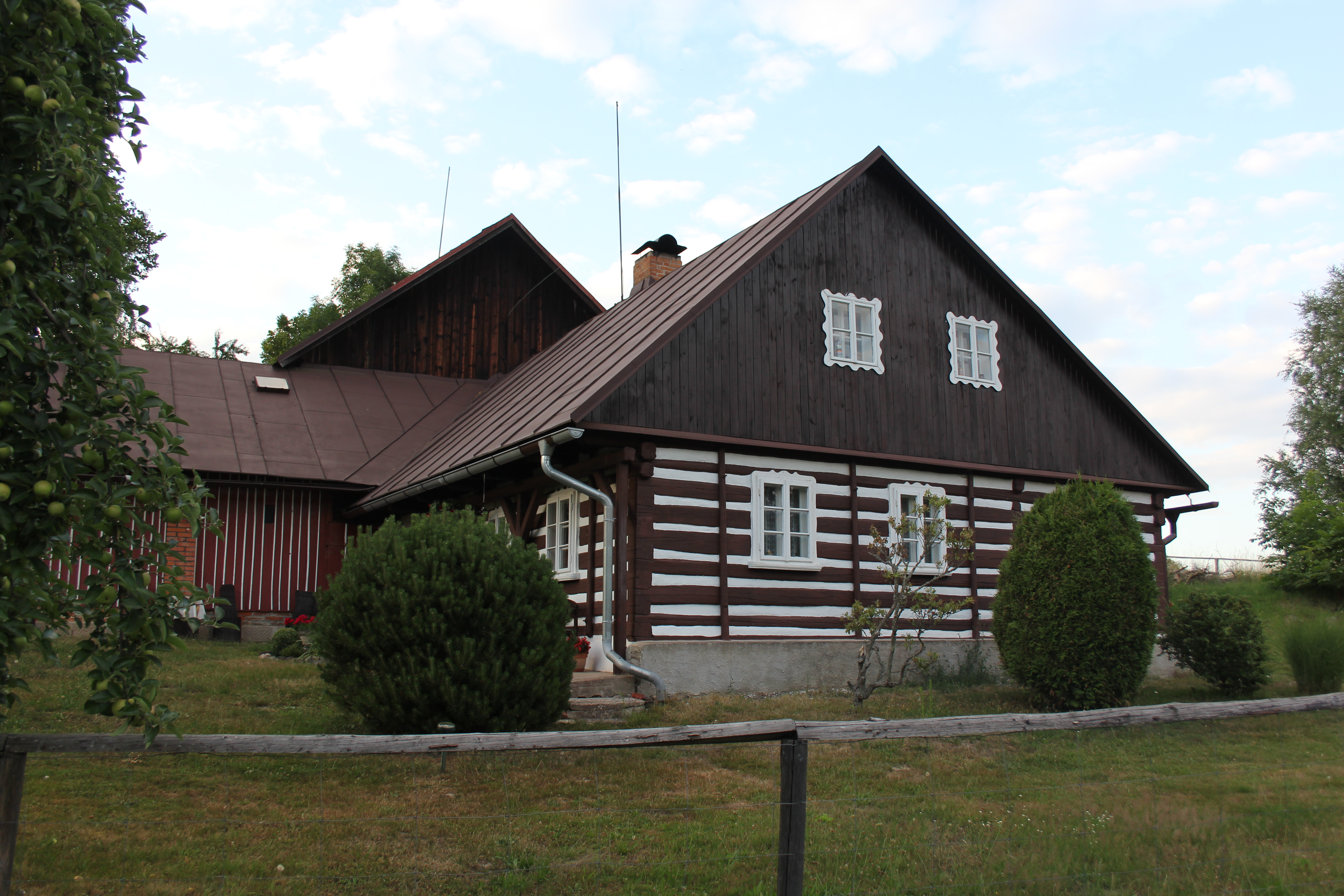 Mokřiny - dům č.p. 6